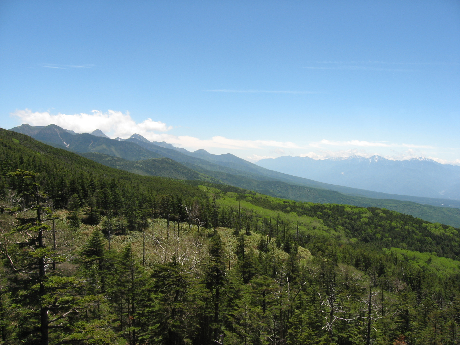 ピラタス蓼科ロープウェイからの蓼科高原